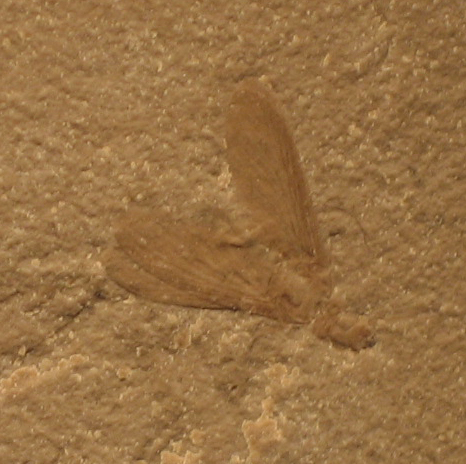 Meiatermes bertrani in Cosmocaixa, Barcelona.